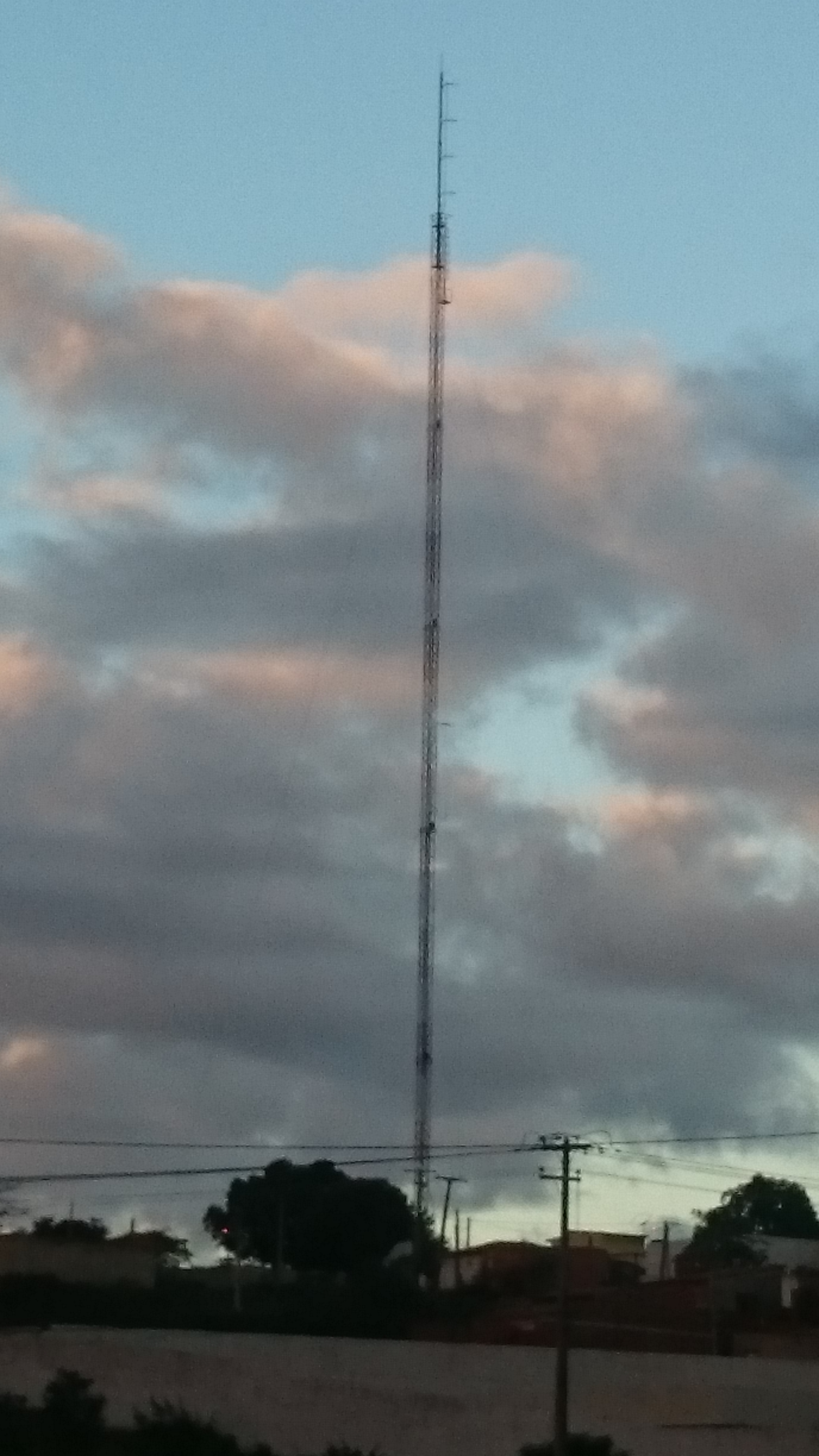 Torre da Rainha FM 97.3 MHz de Senhor do Bonfim